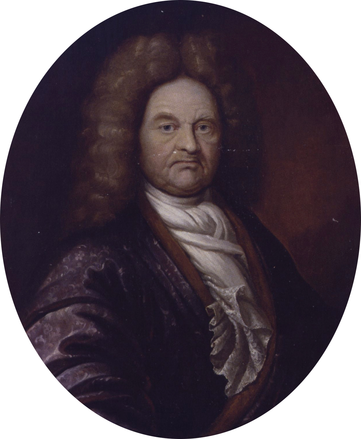 portret van de Groninger burgemeester Wolter Wolthers (1630-1714)